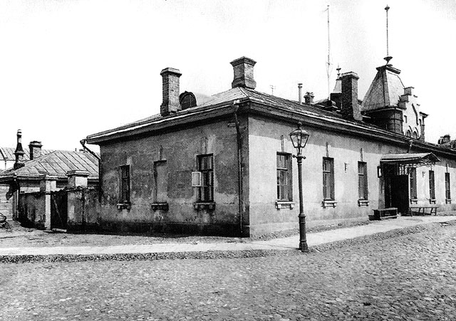 184. Сторожевые дома при Бабьегородской плотинЪ.